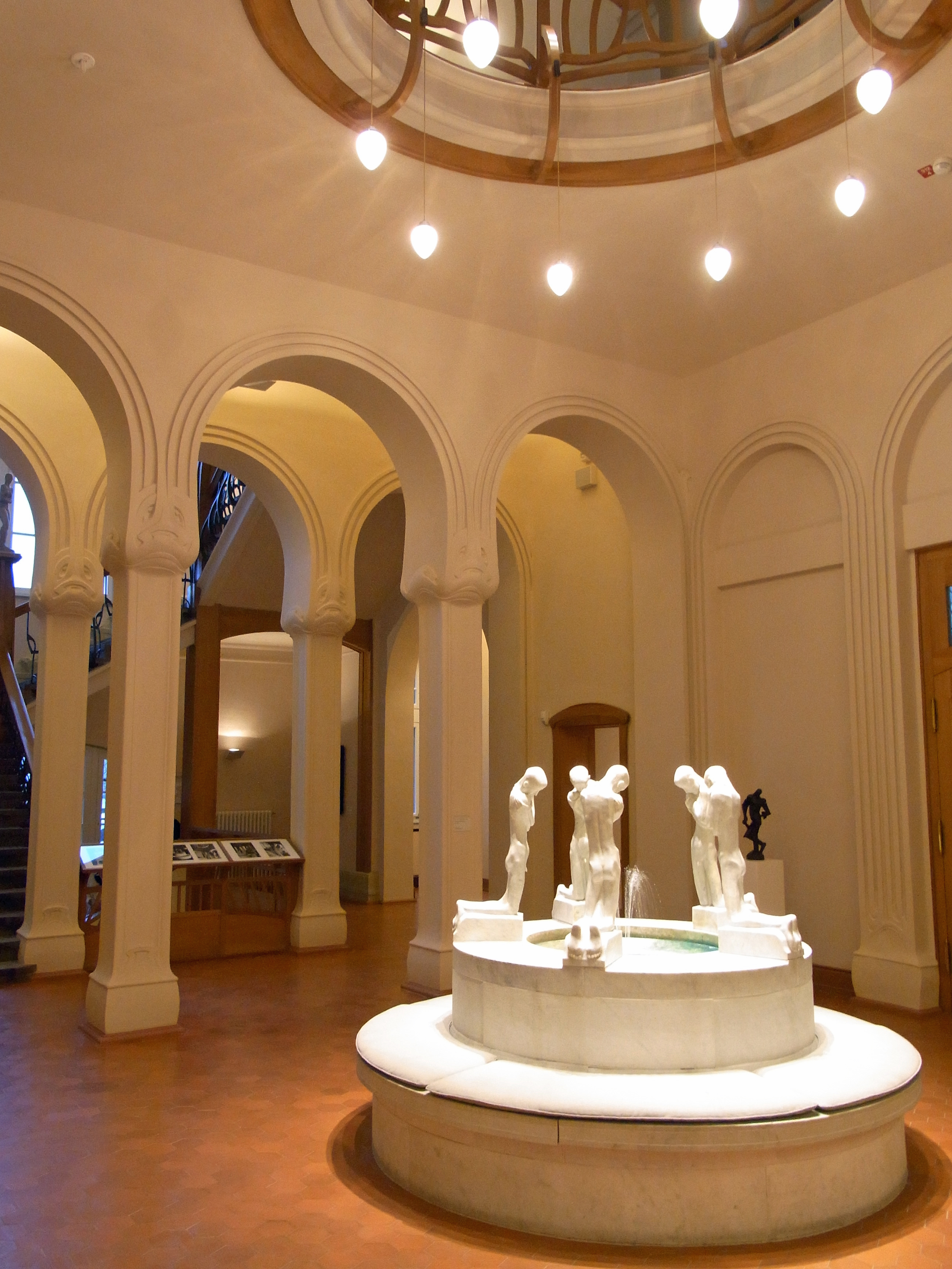 Kunstquartier Hagen Osthaus Museum Hagen Altes Foyer